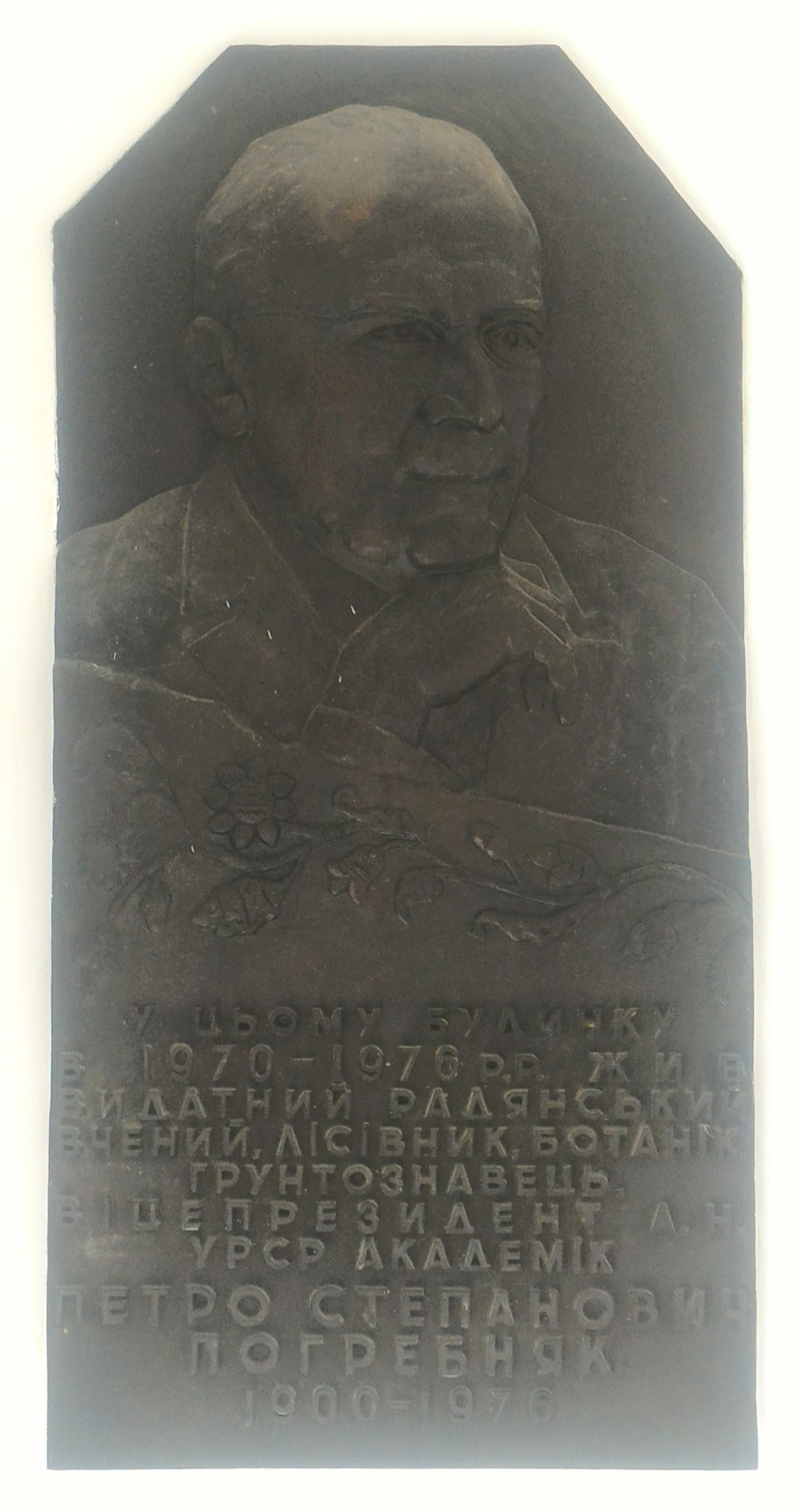 У цьому будинку в 1970-1976 рр. жив видатний радянський учений, лісівник, ботанік, грунтознавець, віцепрезидент А. Н. УРСР академік Петро Степанович Погребняк. 1900-1976. Меморіальна дошка біля входу до житлового будинку 51 во вулиці Володимирській у Києві.